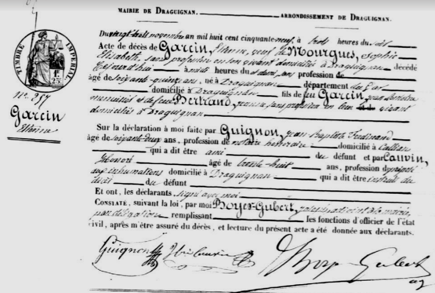 Acte de decès d'Estève Garcin (archius departamentals del Var)